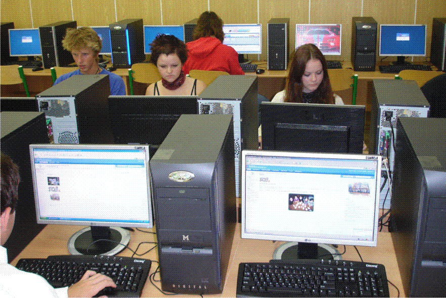 Učebna výpočetní techniky ve VOŠ a SŠ obalové techniky, Štětí